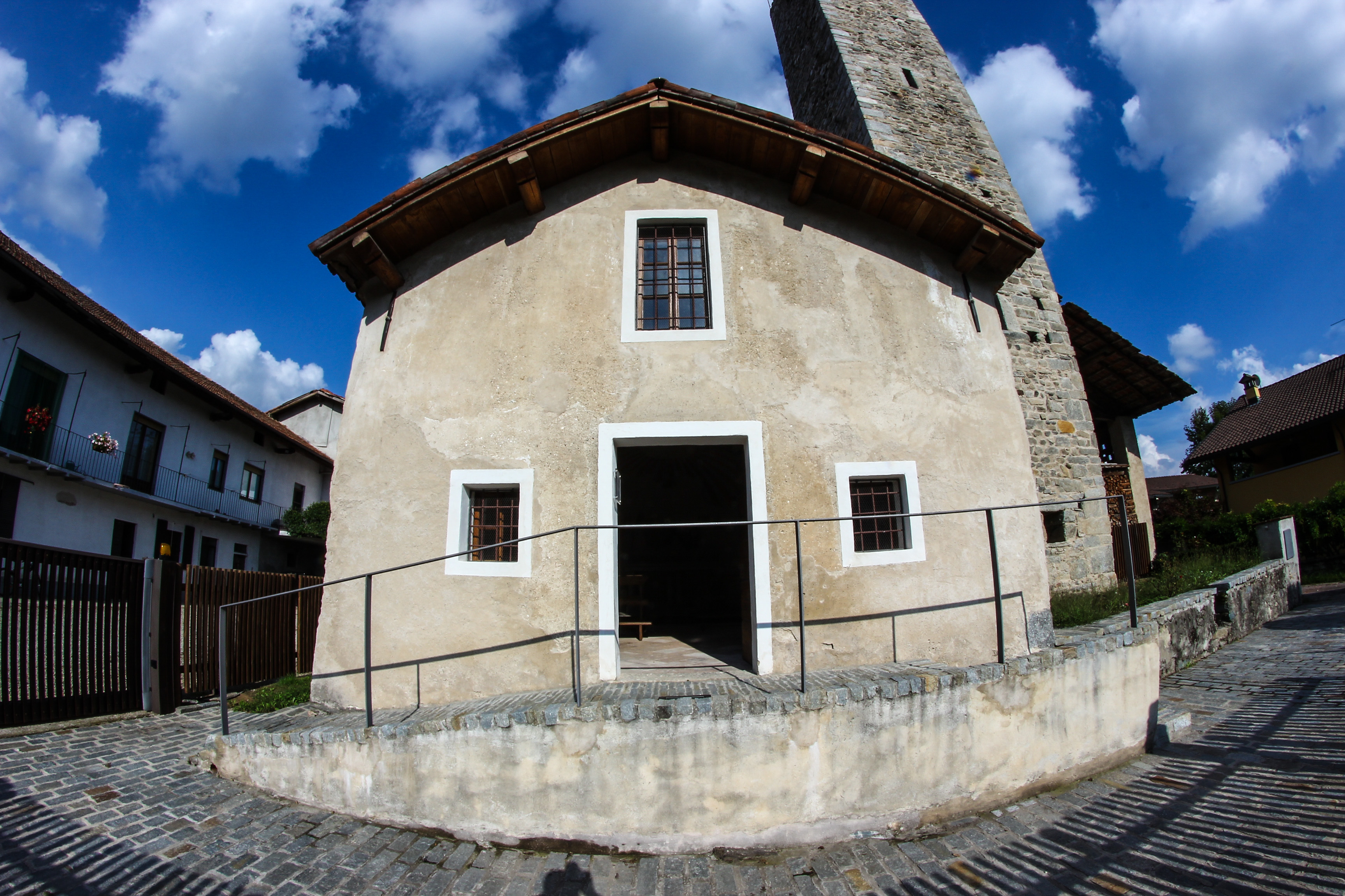 Chiesa di San Nicola _ Borgomanero This is a photo of a monument which is part of cultural heritage of Italy.